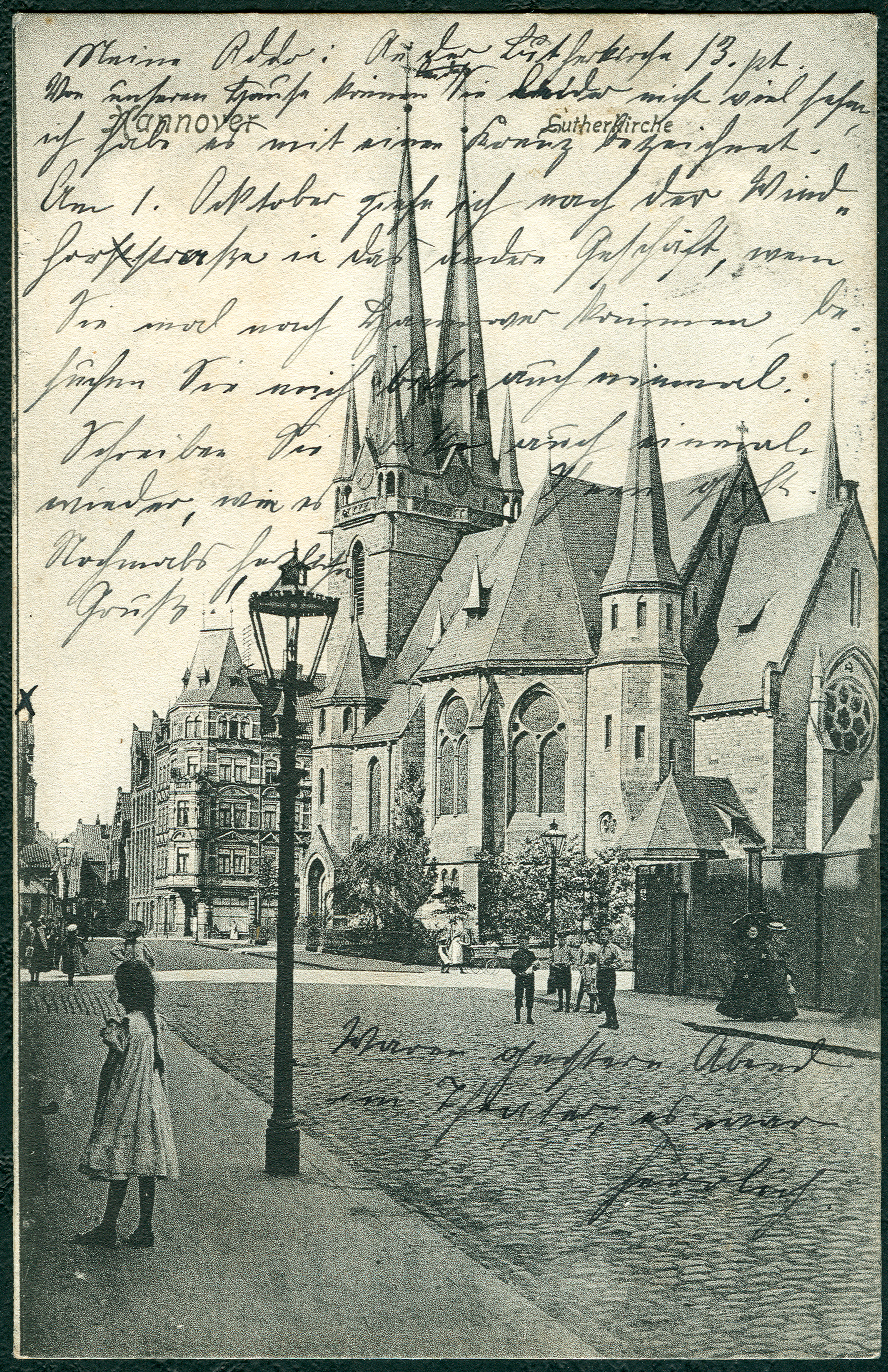 Blick um 1900 in der Nordstadt von Hannover aus der Straße Im Moore entlang der Lutherkirche und weiter in die Heisenstraße ...